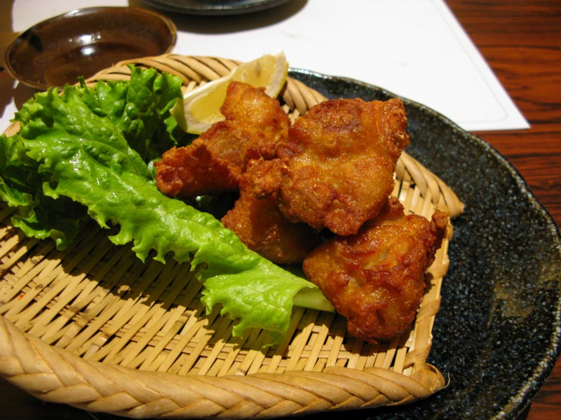 鶏の唐揚げ（石川県金沢市昭和町15-19、金沢駅最寄りの居酒屋「ダイニングテーブル 茜どき」[1]金沢駅前店）